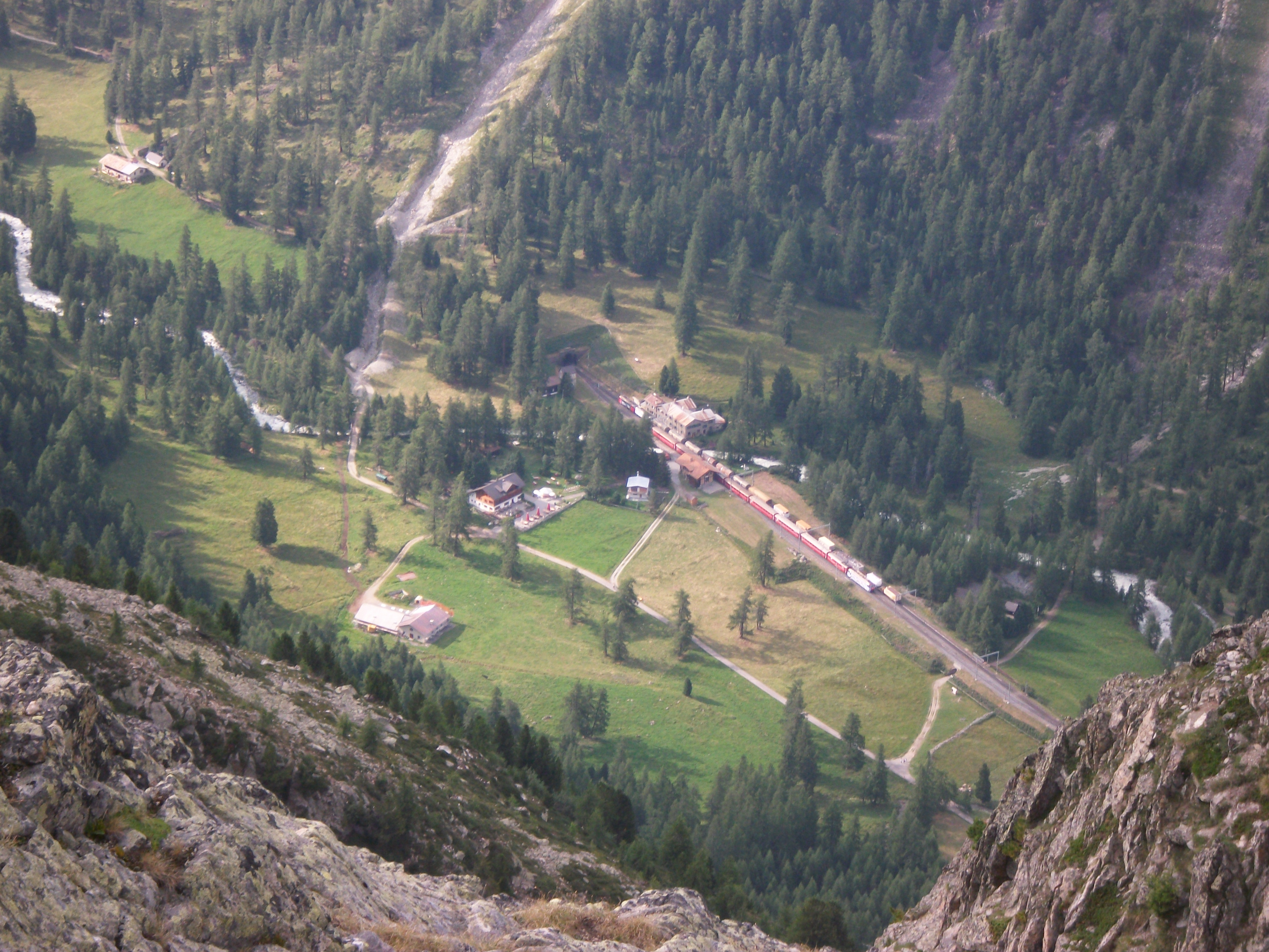 Spinas, GR, Luftbild